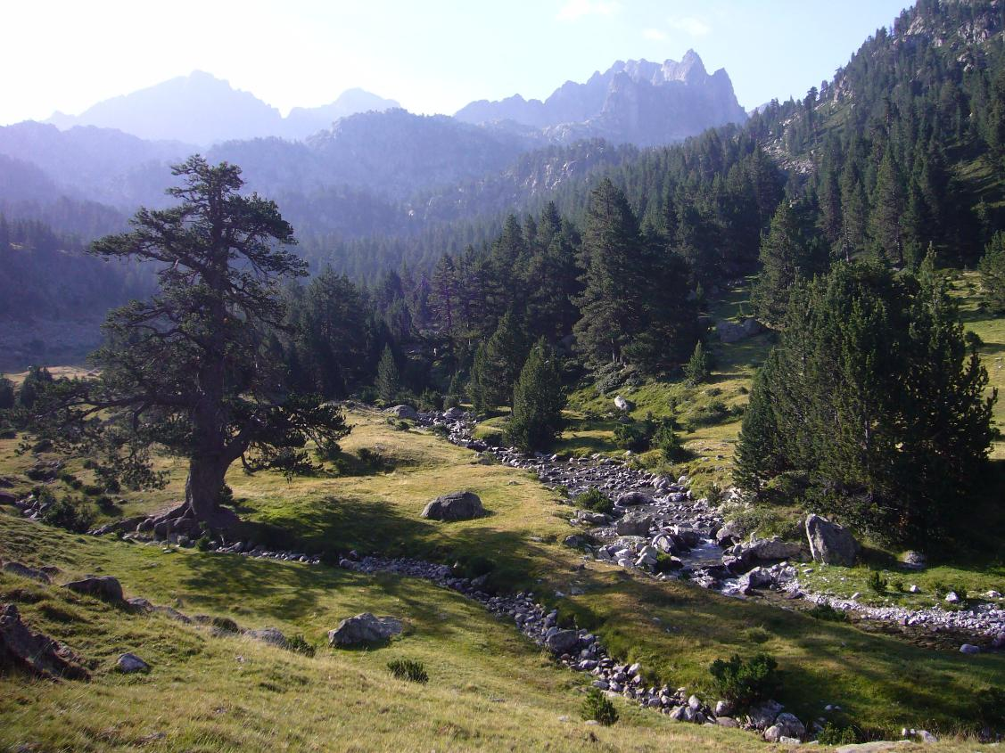 Pi de Peixerani; la Vall de Boí, Alta Ribagorça, Catalunya. This is a a photo of a protected or outstanding tree in Catalonia, Spain, with id: MA-05.043.03